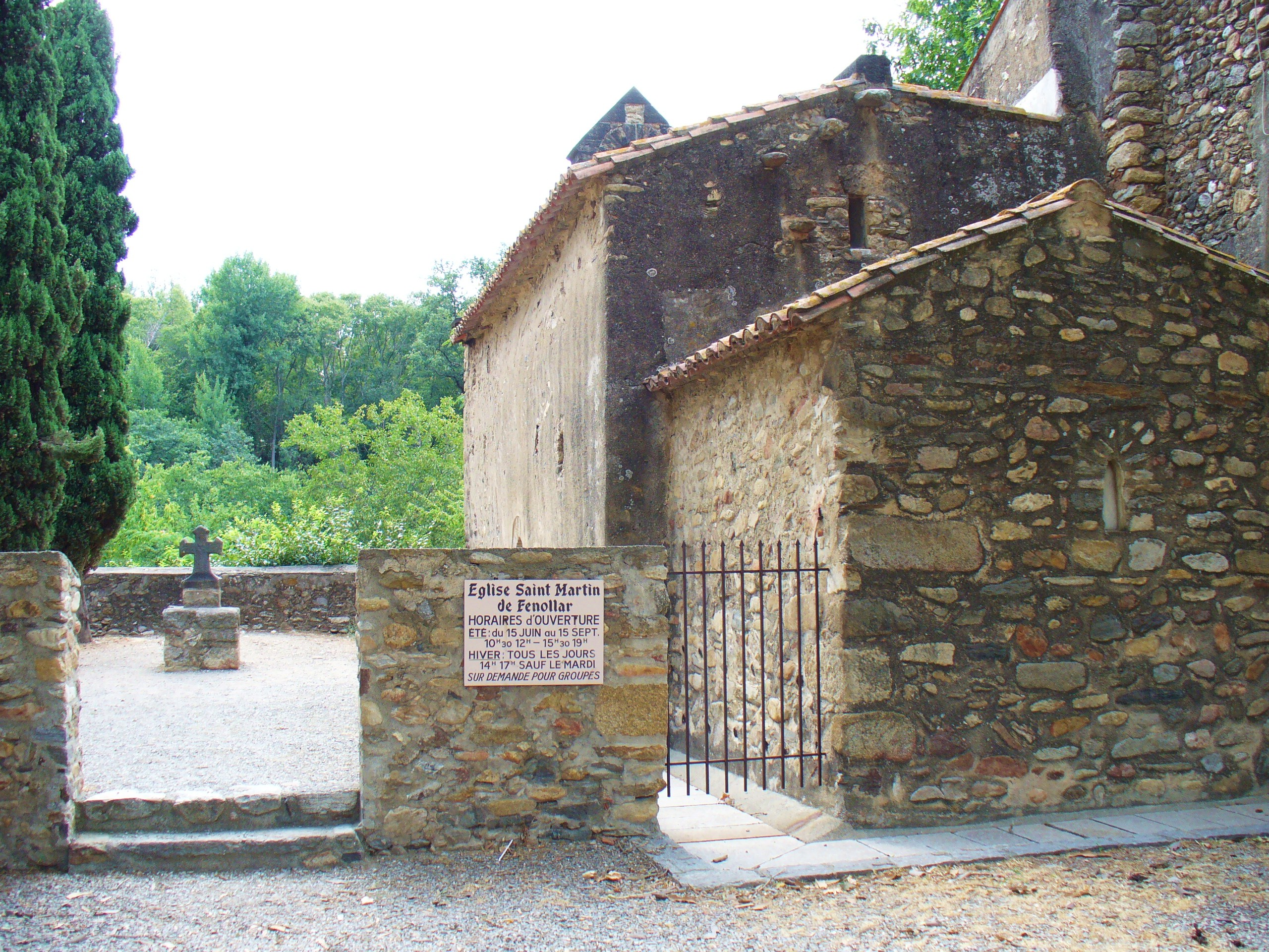 Die Kapelle Saint-Martin-de-Fenollar